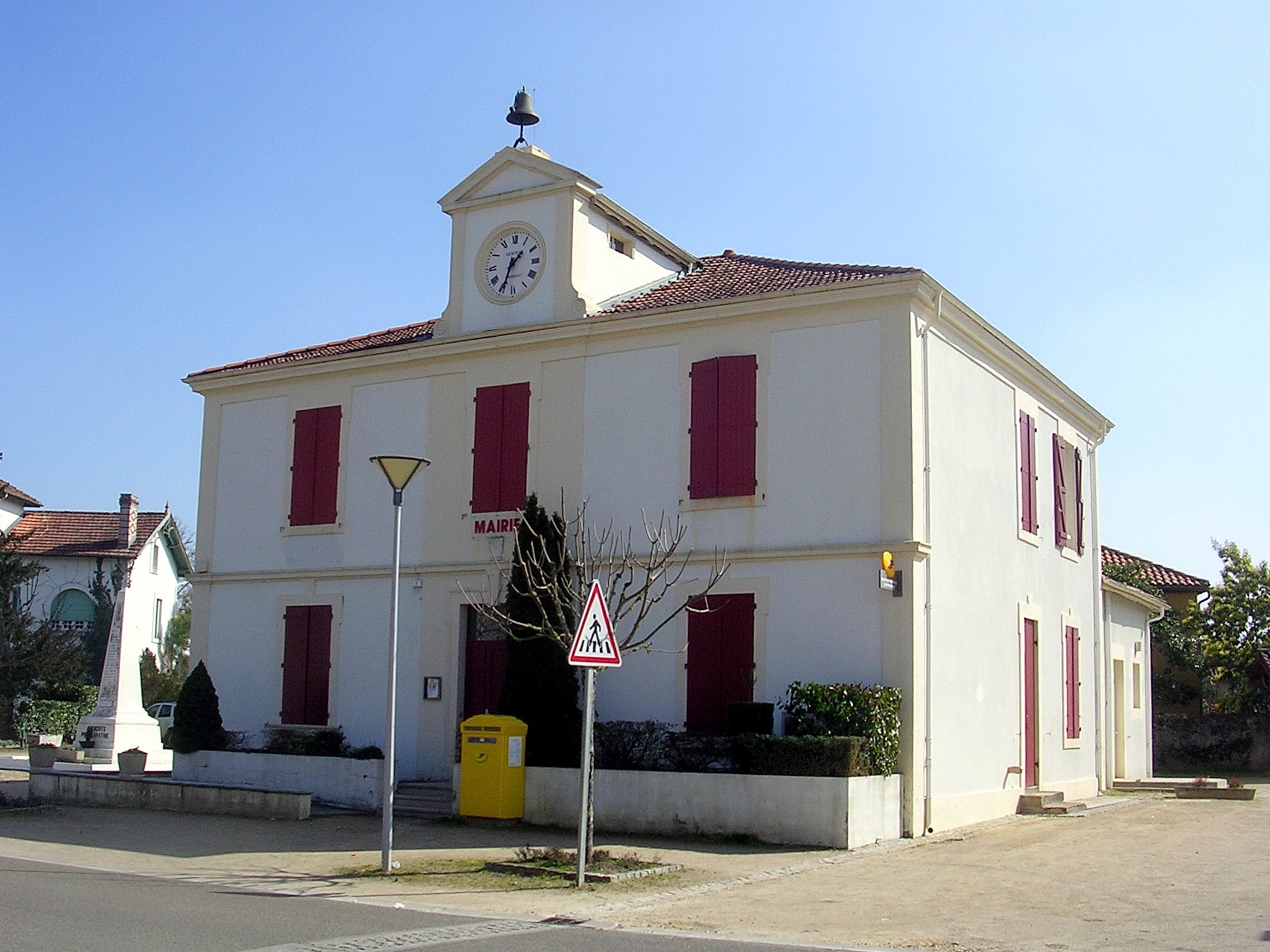 Mairie de Luglon, dans le département français des Landes